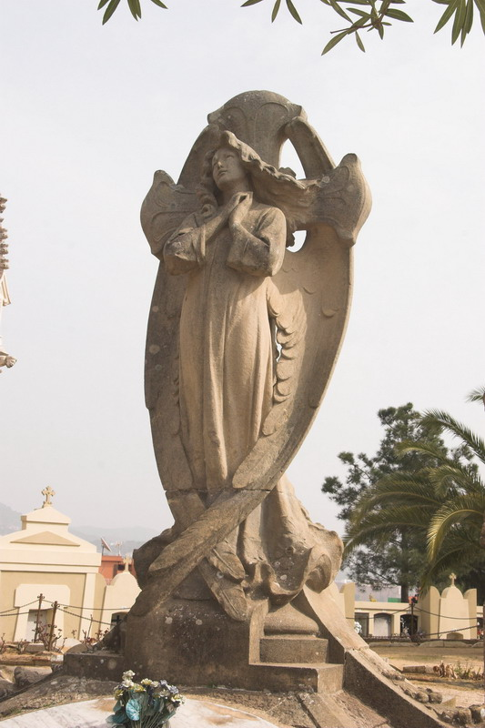 Hipogeu Durall-Suris(Lloret de Mar-La Selva-Catalunya), dins del cementiri modernista de Lloret de Mar (1903), obra de Bonaventura Conill i Montobbio(1876-1946).